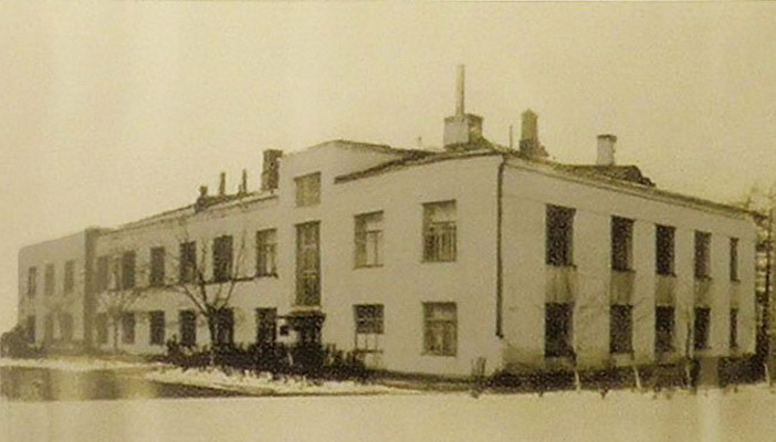 Здание научно-исследовательского института "Уралмеханобр" до надстройки.